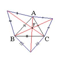 Ferma nöqtəsinin tapılması